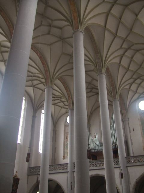 Stadtpfarrkirche St. Martin ("Martinsmünster"), Lauingen/Donau Blick ins Innere